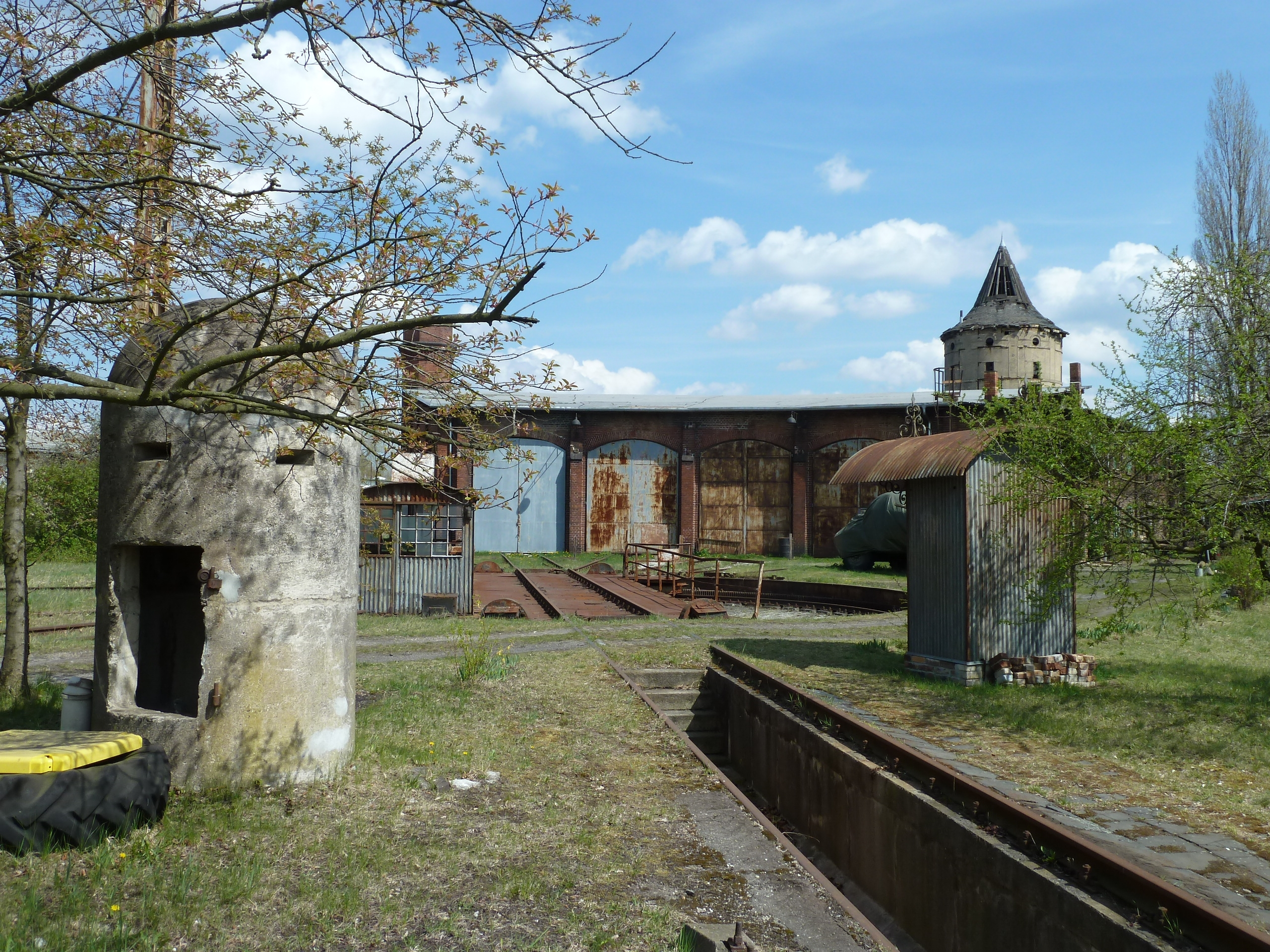 Finsterwalde, ehemaliges Bahnbetriebswerk